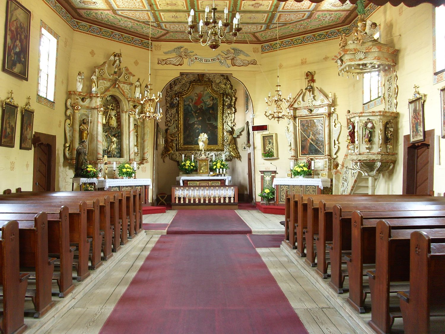 Dobrzeń Wielki - kościół odpustowy pw. św. Rocha (1658, 1752, 1928, 1958 i 2006)